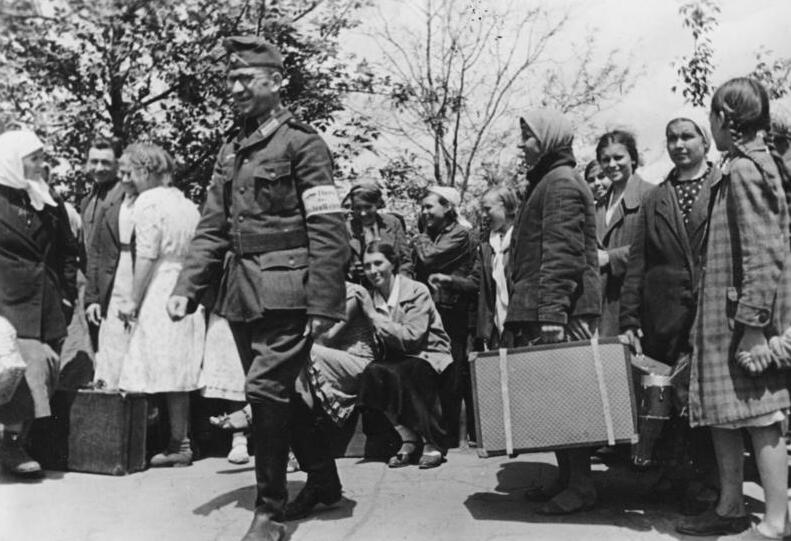 ADN-Zentralbild/Archiv II. Weltkrieg 1939-45 In dem von der faschitischen deutschen Wehrmacht besetzten Gebiet in der Ukraine, Mai 1942. Die Zivilbevölkerung in Artemowak muß sich in dem von der deutschen Zivilverwaltung eingerichteten Arbeitsamt melden, um bei Tauglichkeit als Zwangsarbeiter in der deutschen Rüstungsindustrie eingesetzt zu werden. UBz: die gemusterten Zwangsarbeiter fertig zum Abtransport nach Deutschland. [Aufnahme: Knödler, Scherl Bilderdienst] 3314-42